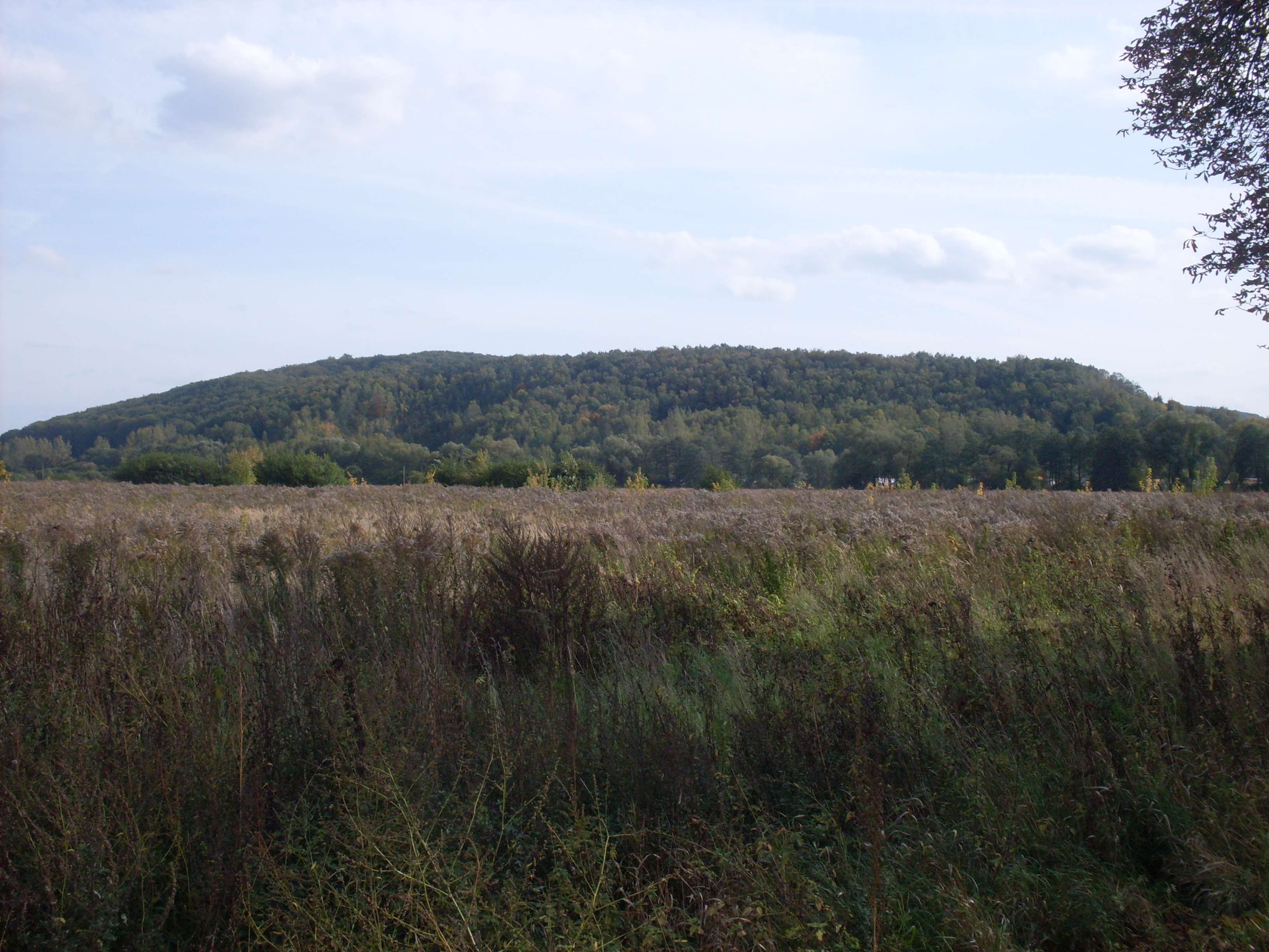 Ułańskie Zdrowie. Widok z północy